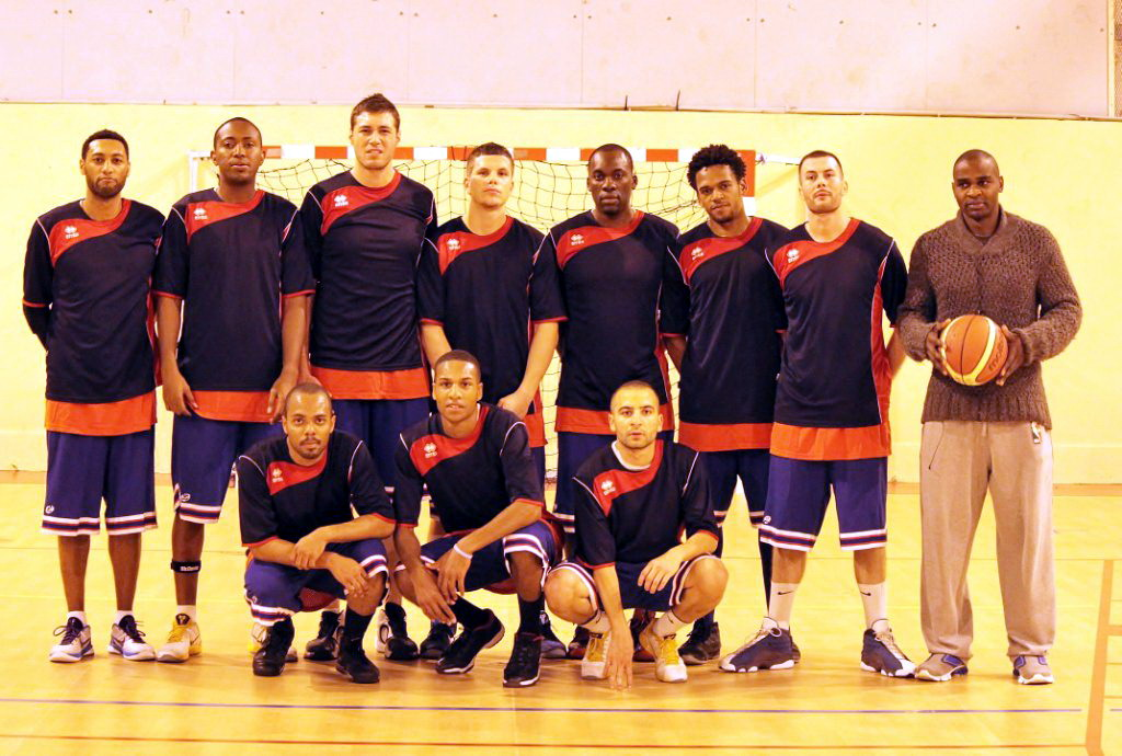 Équipe Seniors 1 2011-12